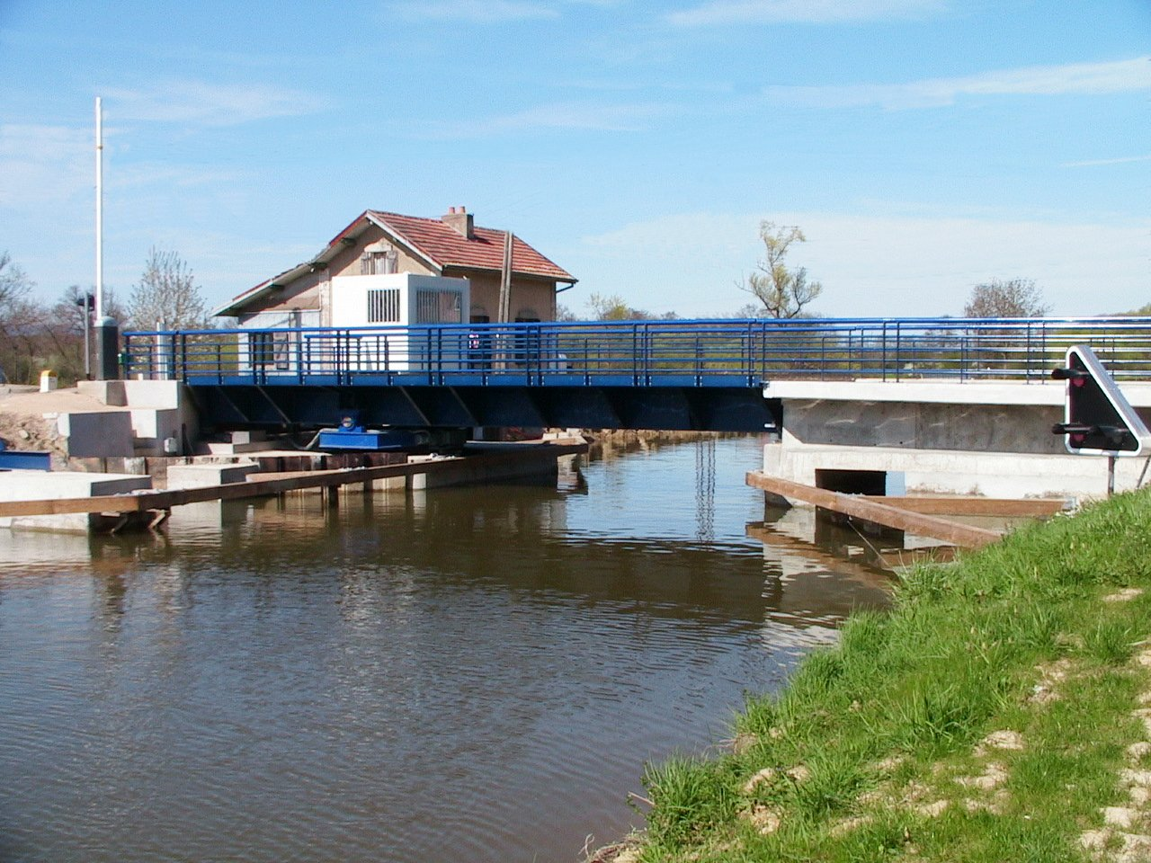 Canal du Rhone au Rhin, pont tournant à Froidefontaine (90) Photo prise fin avril 2006 par F5ZV